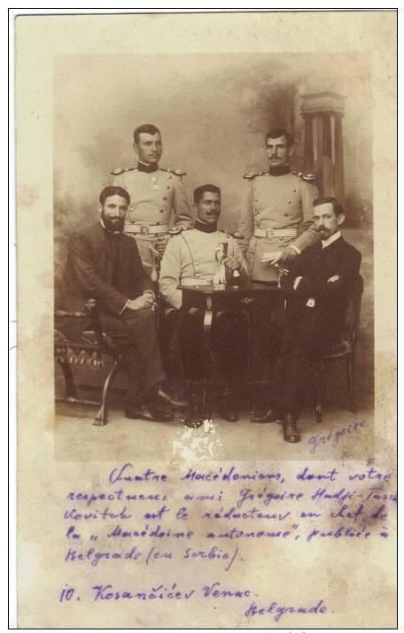 Григор Хаджиташкович